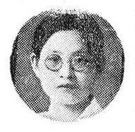 장덕희, 독립운동가 장덕준, 장덕수, 장덕진의 여동생